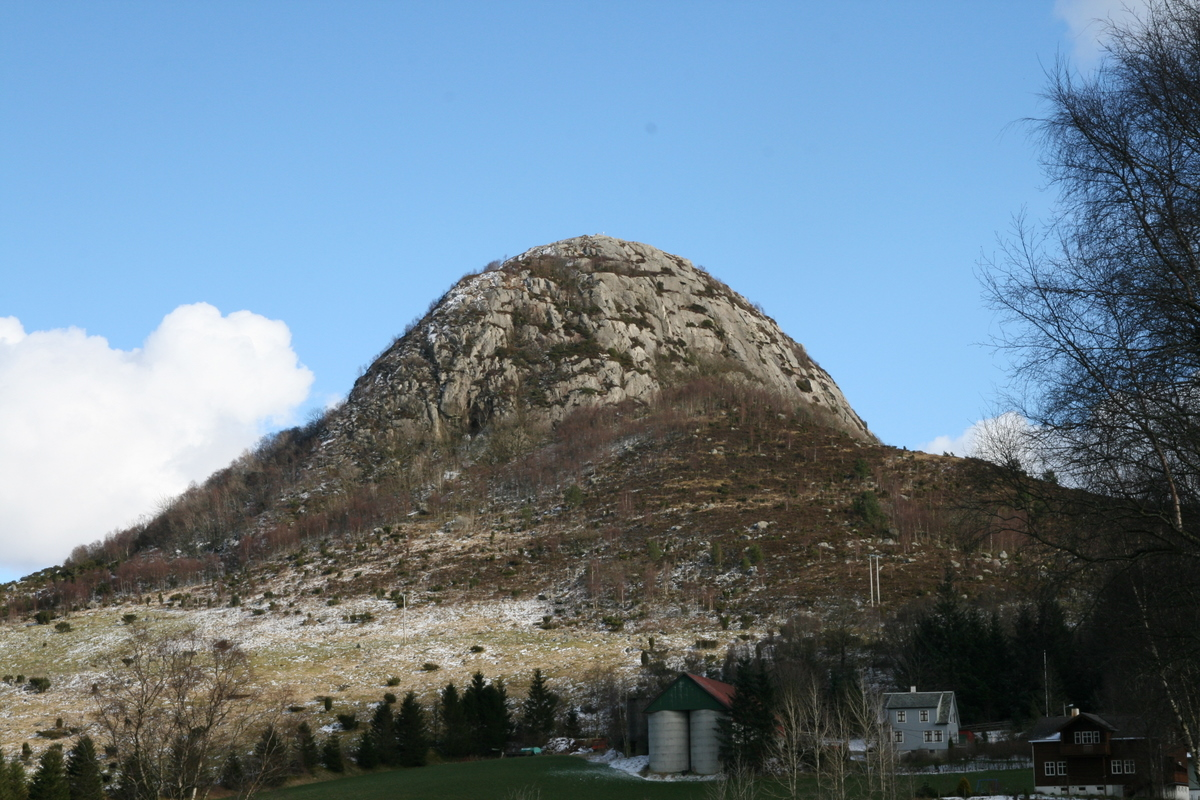 Sygno